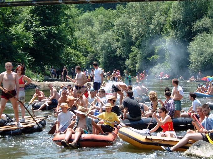 Српски (ћирилица): Весели спуст